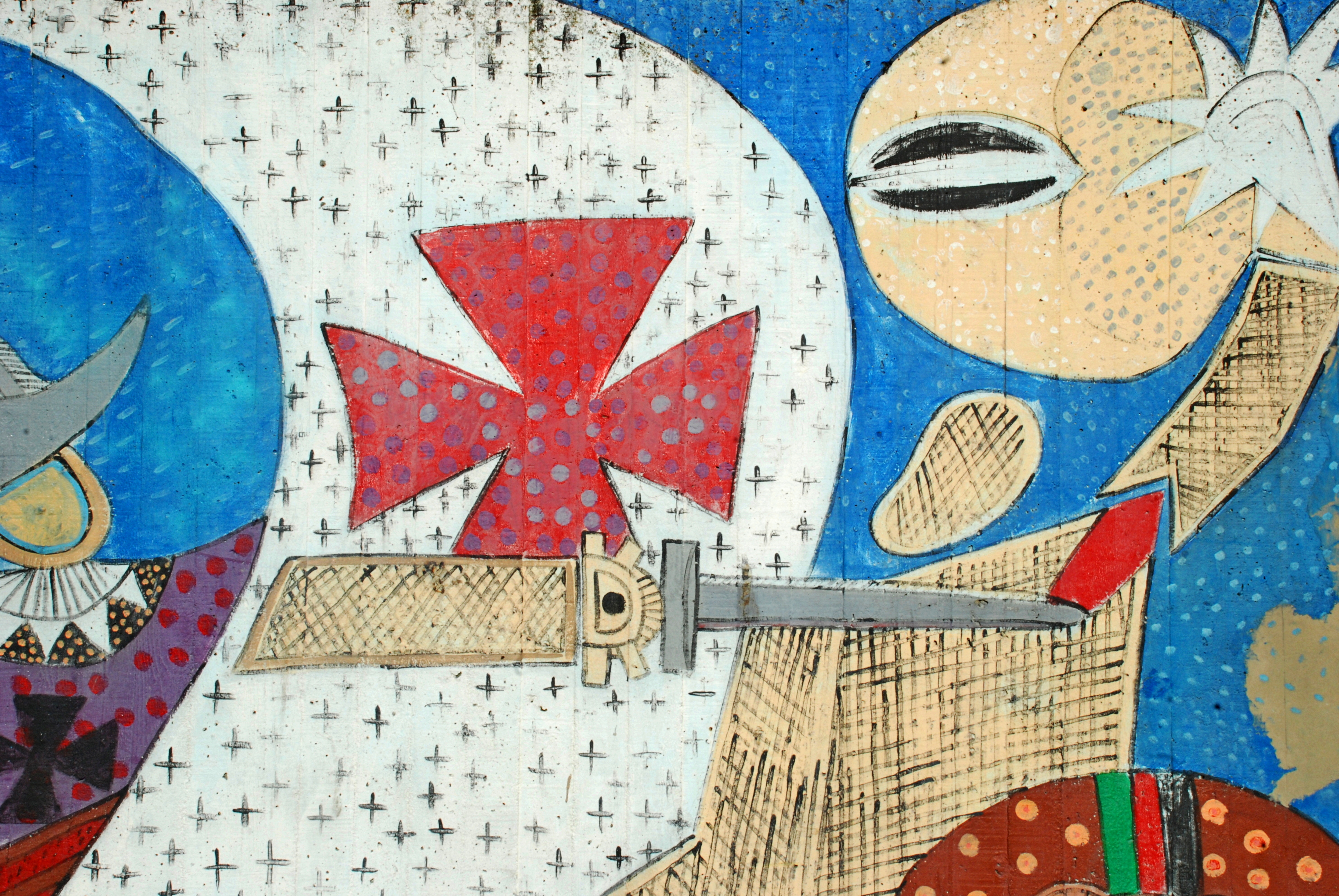 Belgique - Louvain-la-Neuve - Théâtre Jean Vilar - fresque Cyclone des races (Francisco Rivero 1992)